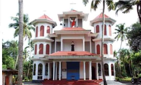 ബ്ലെസ്സഡ്.മറിയം ത്രേസ്സ്യ ചർച്ച് ഷോളയാർ, കാരൂർ